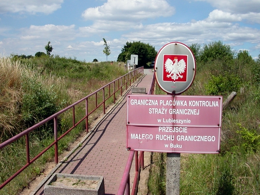 Przejście małego ruchu granicznego Buk-Blankensee Autor: Amber (R), 2005-06-30